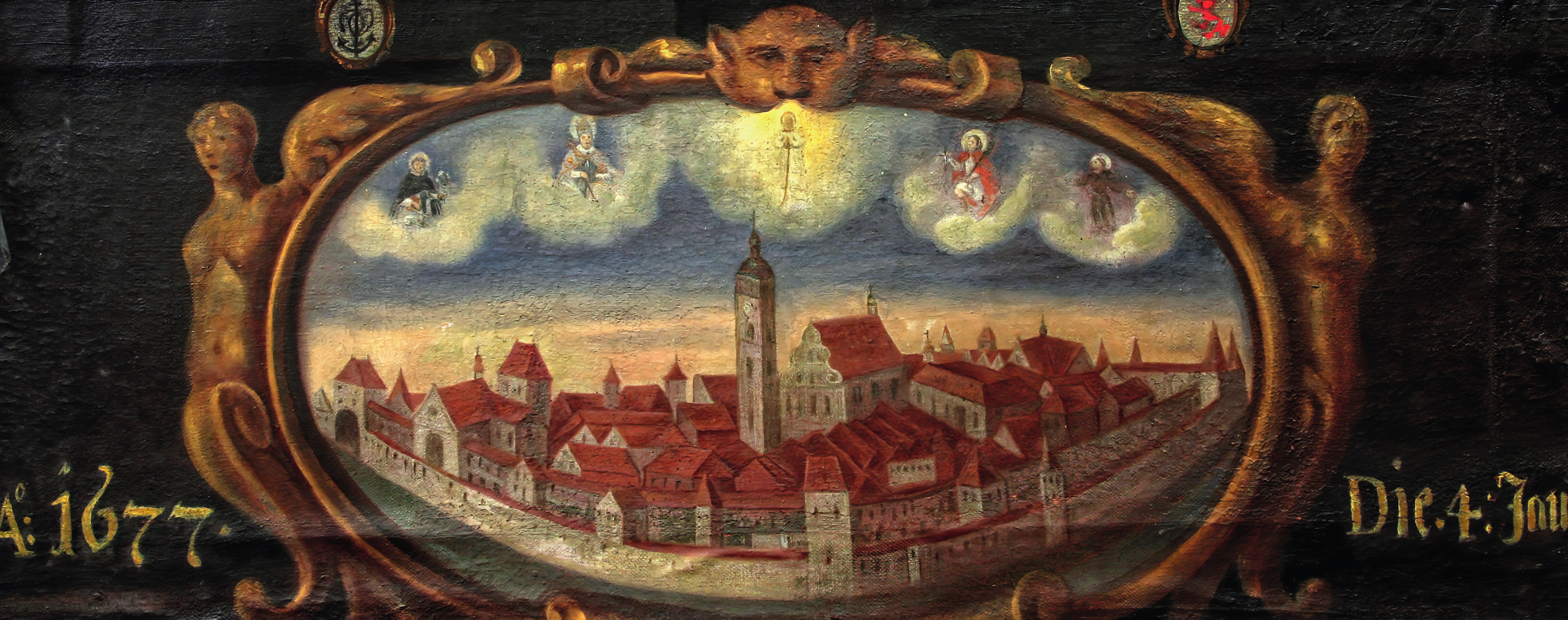 veduta Českých Budějovic na obrazu Panny Marie Budějovické (1677) s ochránci města sv. Dominikem, sv. Mikulášem, Pannou Marií Budějovickou, sv. Auraciánem a sv. Františkem z Assisi